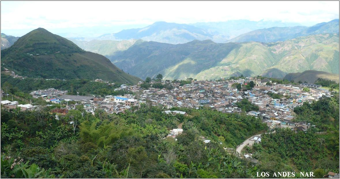 fotografía tomada de la parte más alta